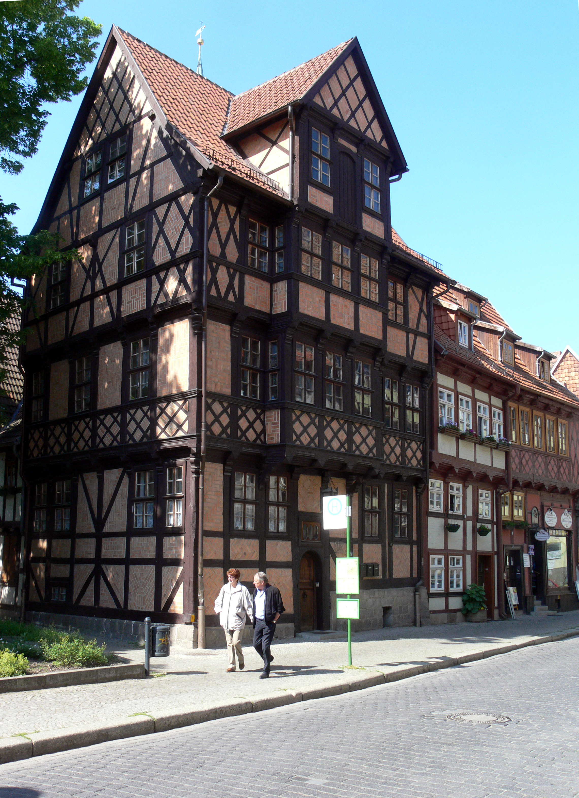 Haus Steinweg 6 in Quedlinburg.